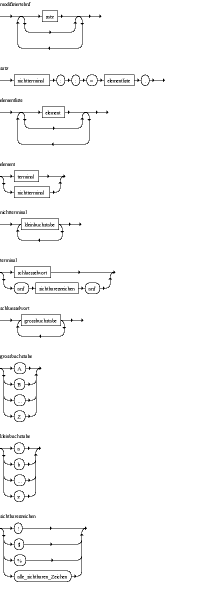 modified EBNF (syntax diagrams)